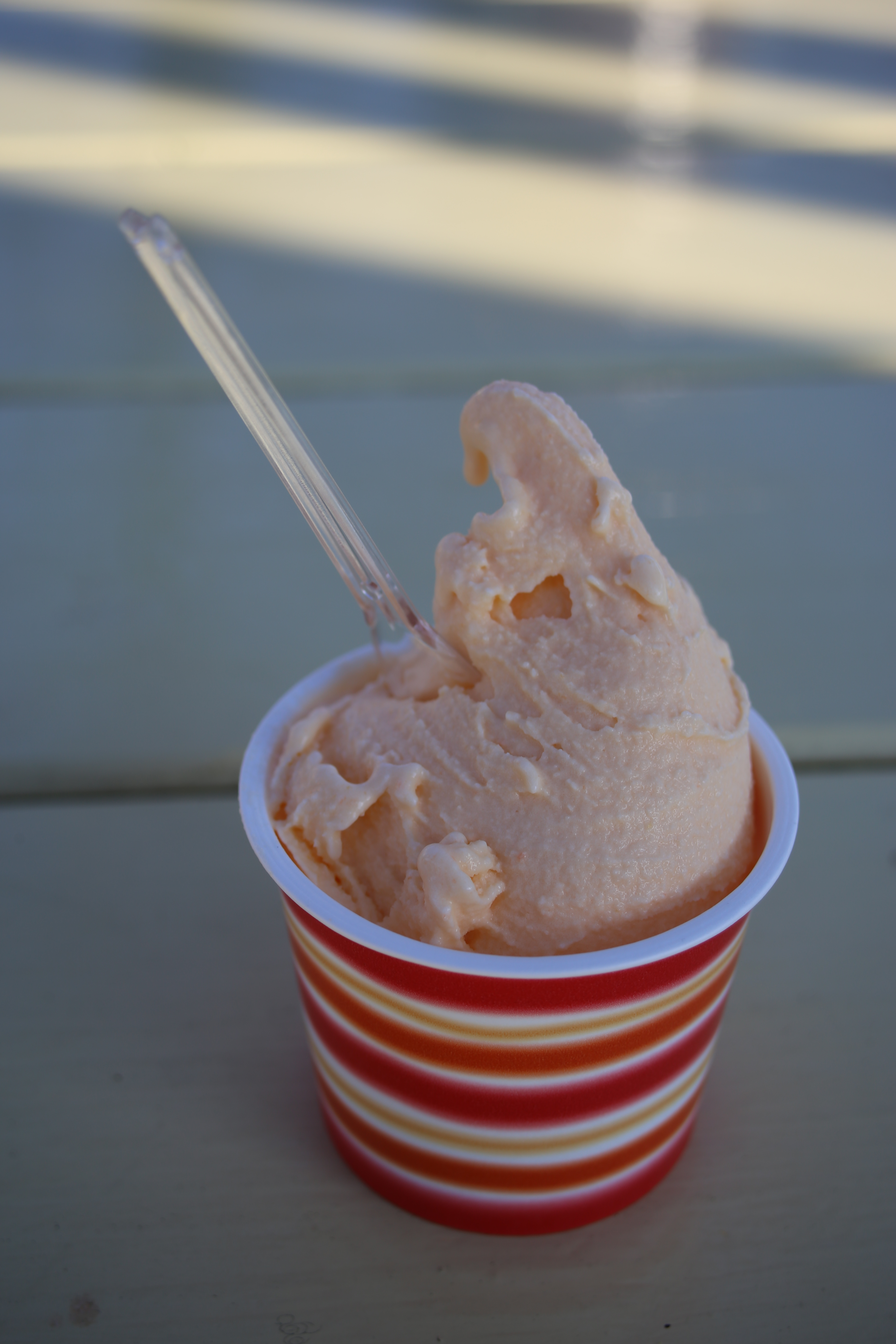 名古屋市天白区の名古屋市農業センターにおいて販売されている八事五寸人参を使用したアイスクリーム